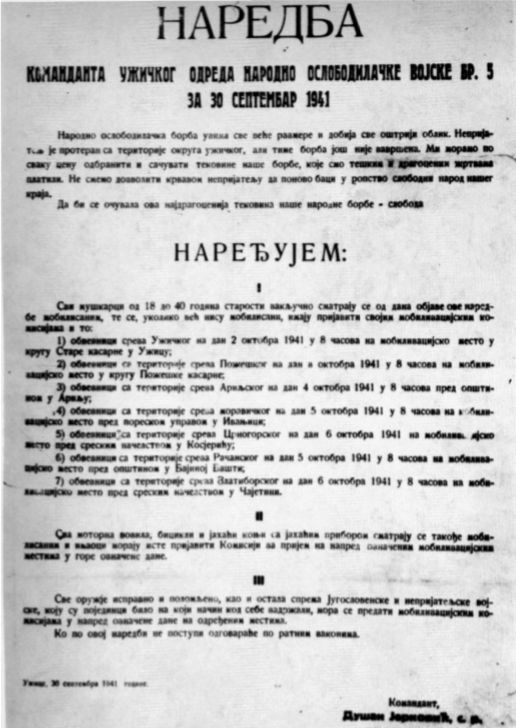 Srpskohrvatski / српскохрватски: Naredba komandanta Užičkog partizanskog odreda za mobilizaciju vojnih obveznika na oslobođenom području, od 30. septembra 1941.